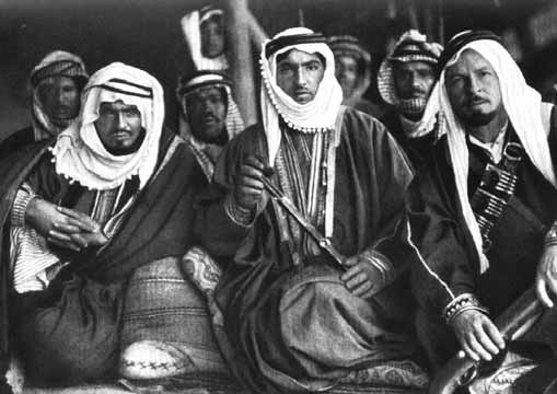 Carl Raswan (rechts) mit seinem Blutsbruder Prinz Amir Fuaz (Mitte) im Zelt der Ruala-Beduinen.